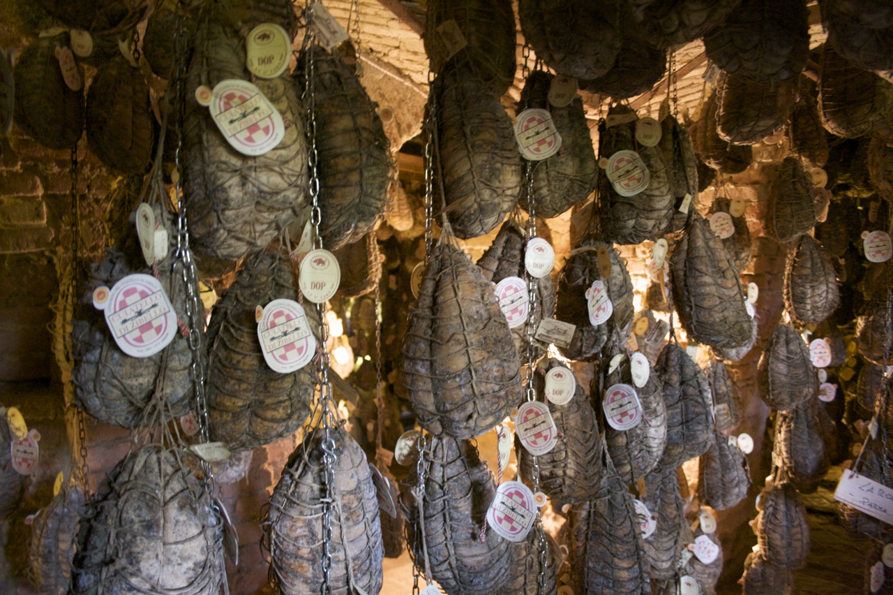 Cantina di stagionatura dei culatelli di Zibello - Italia.